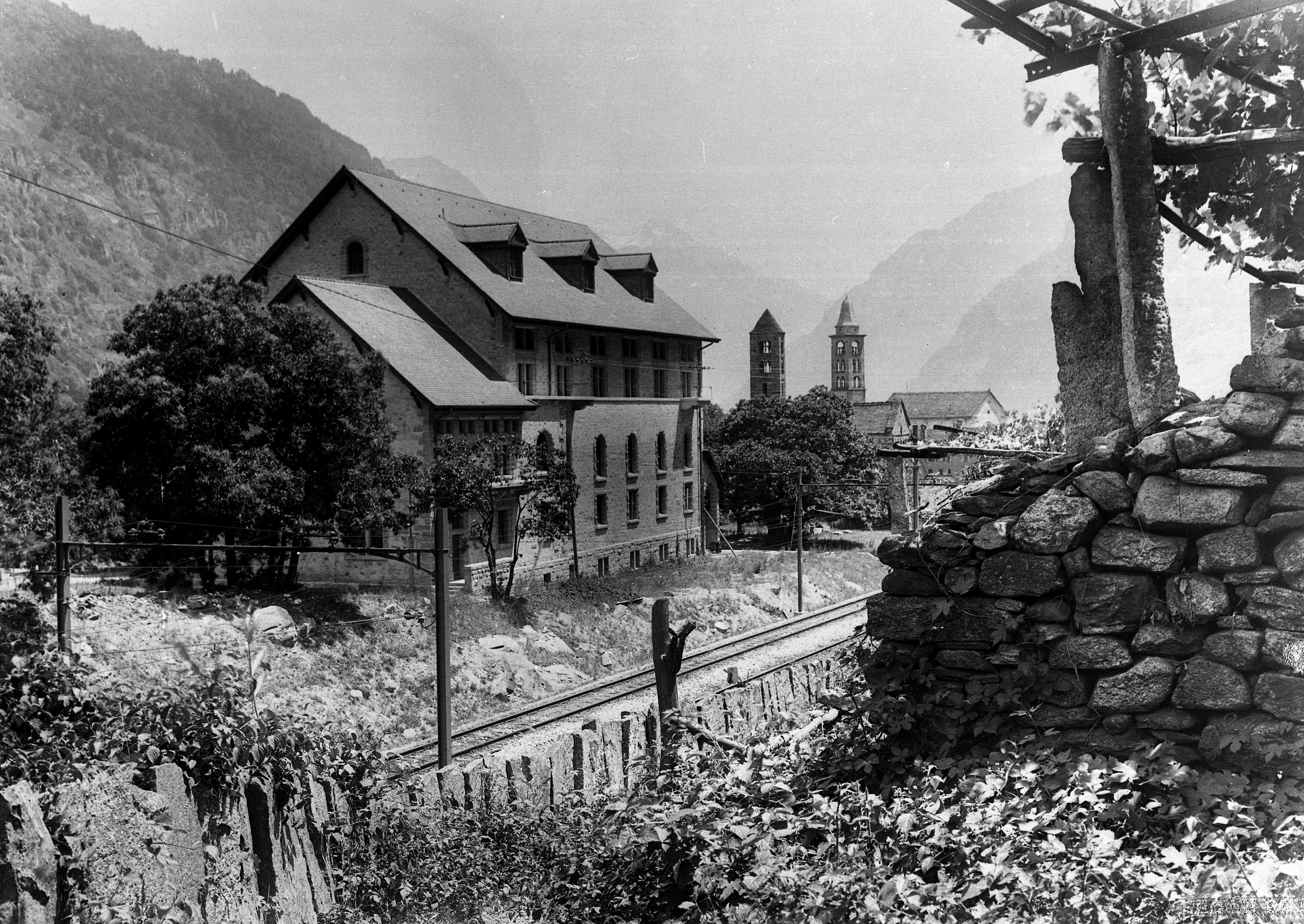 Unterwerk Giornico. Im Hintergrund die Kirchen San Nicola und San Michele.